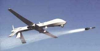 Armed Predator drone firing Hellfire missile